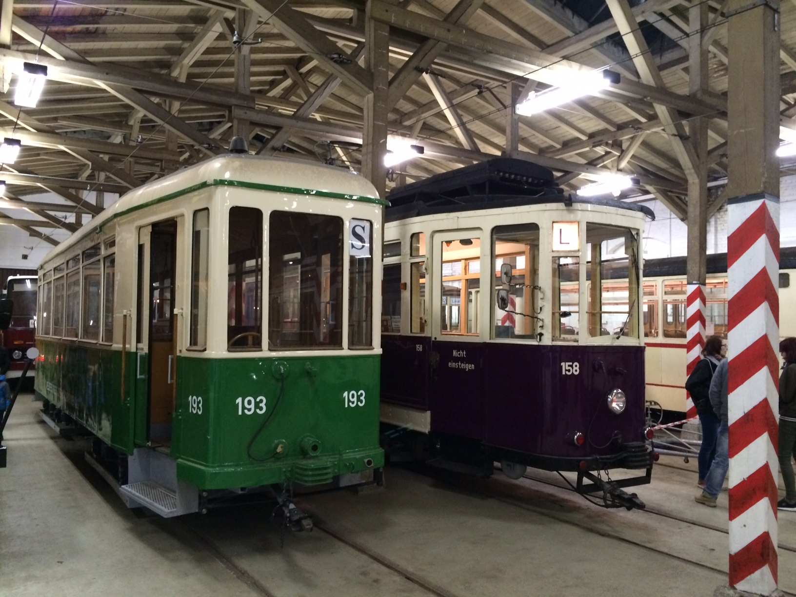 Beiwagen mit der Nummer 193 im Straßenbahnmuseum Halle (Saale), Hersteller Gottfried Lindner AG